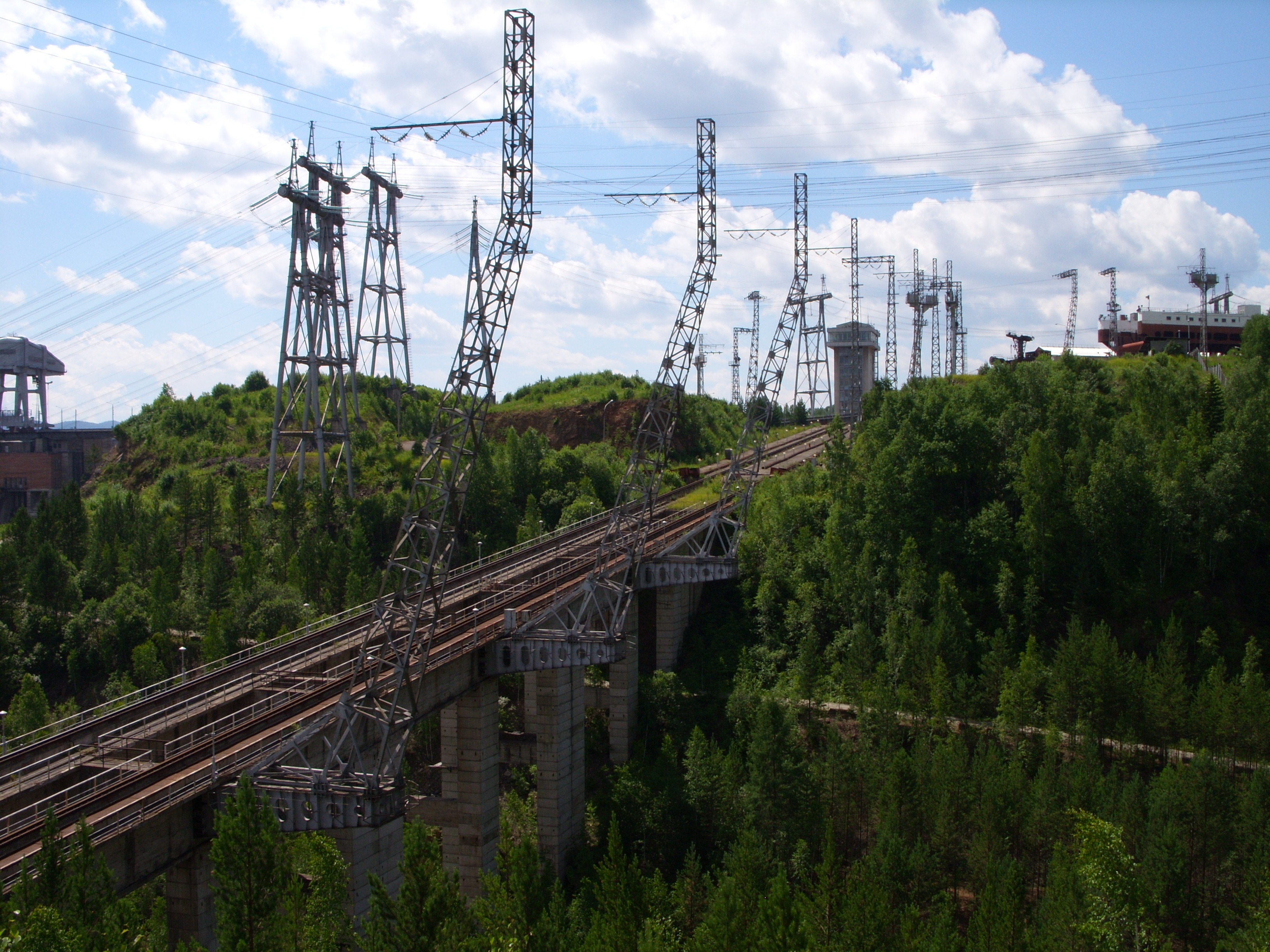 снимки июля 2008 г.